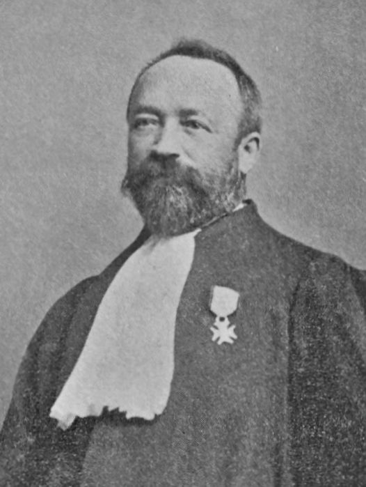 Michel Engels